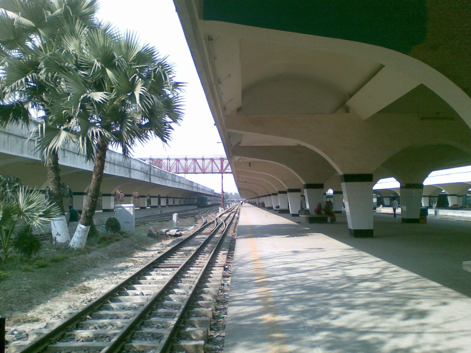 Kamlapur Railway Station, Dhaka, Bangladesh.